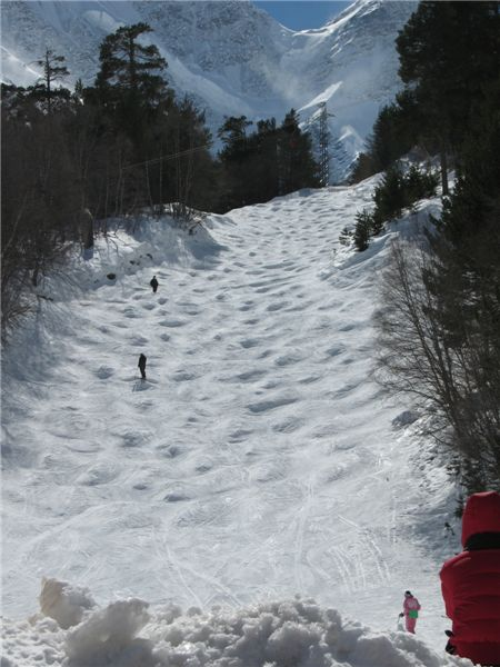 Вид на бугры в трубе на горе Чегет.